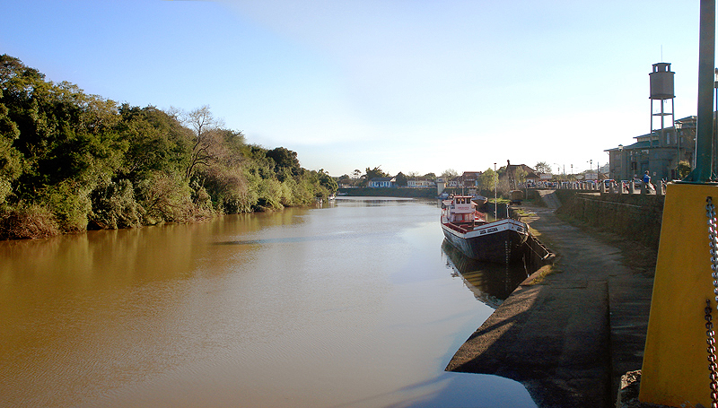 Cais do Porto de Montenegro, Rio Grande do Sul, à margem do Rio Caí.